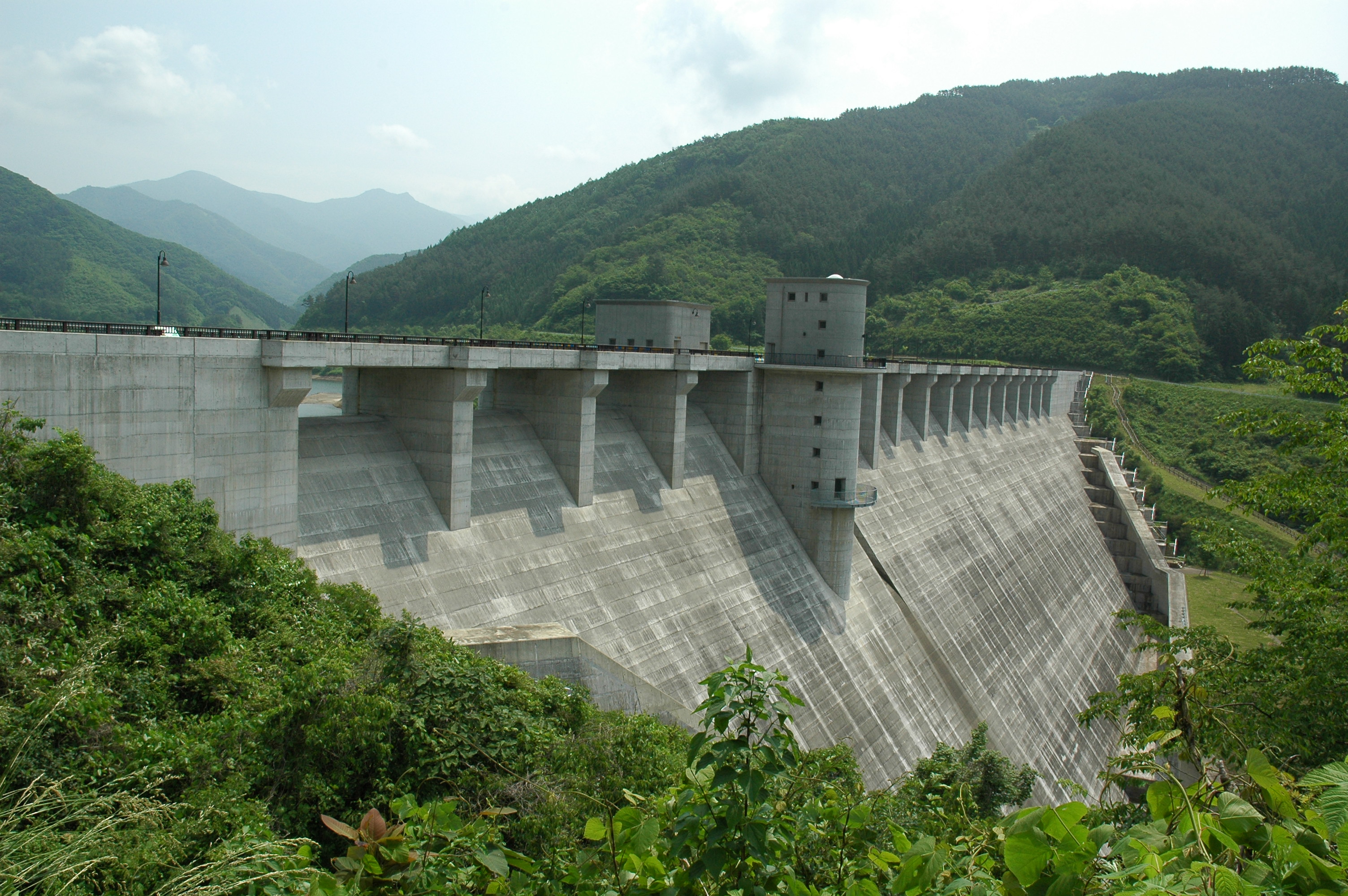 早池峰ダム(hayachine Dam) 撮影者：利用者:EMPEX 2005.06.19